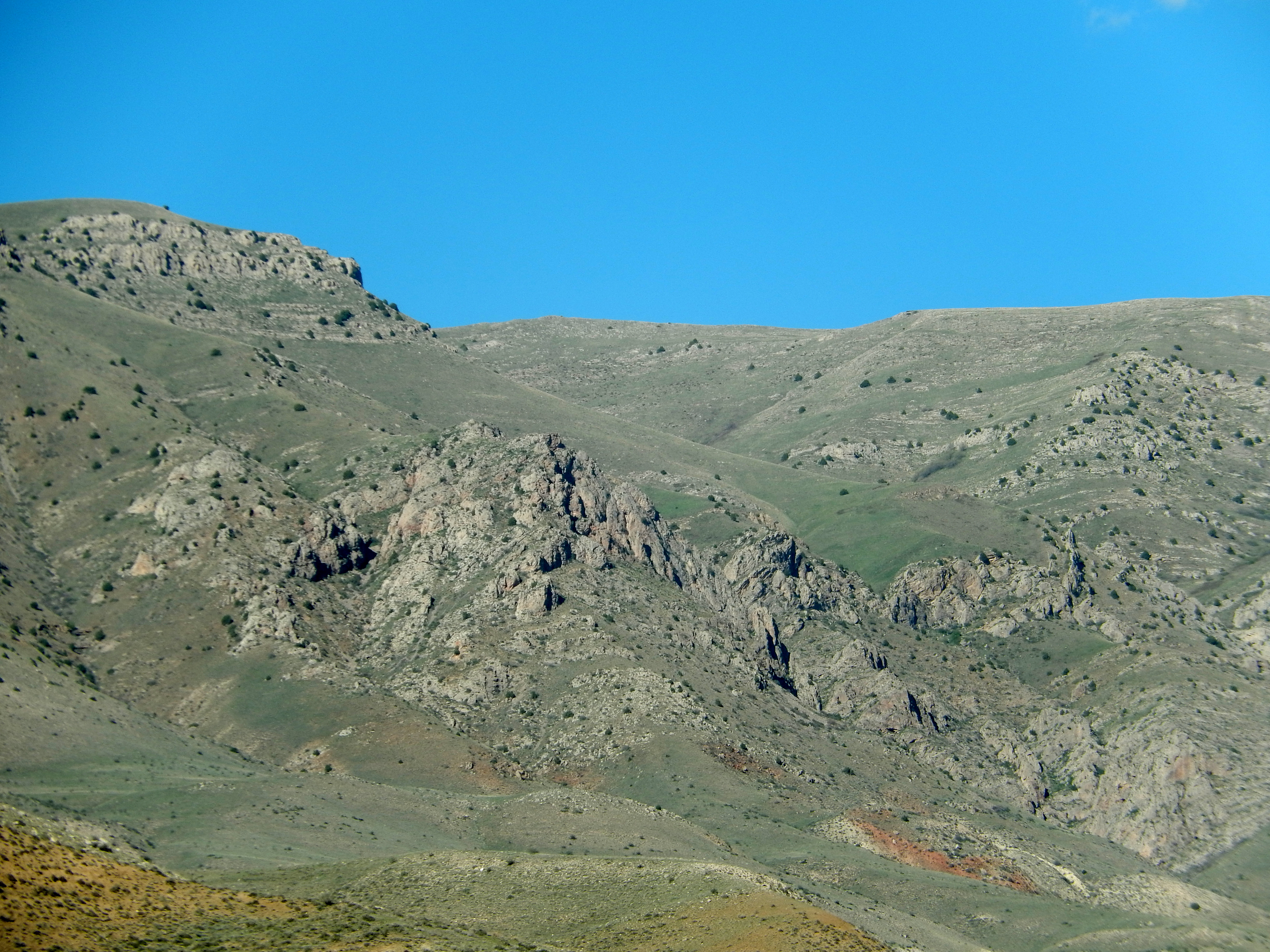 «Խոր հոր» անձավային համակարգ